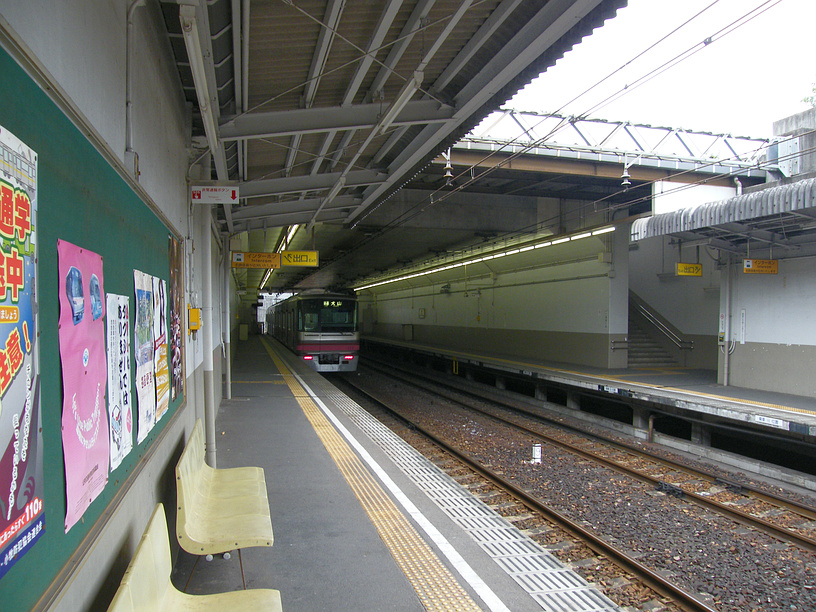 小牧口駅ホーム